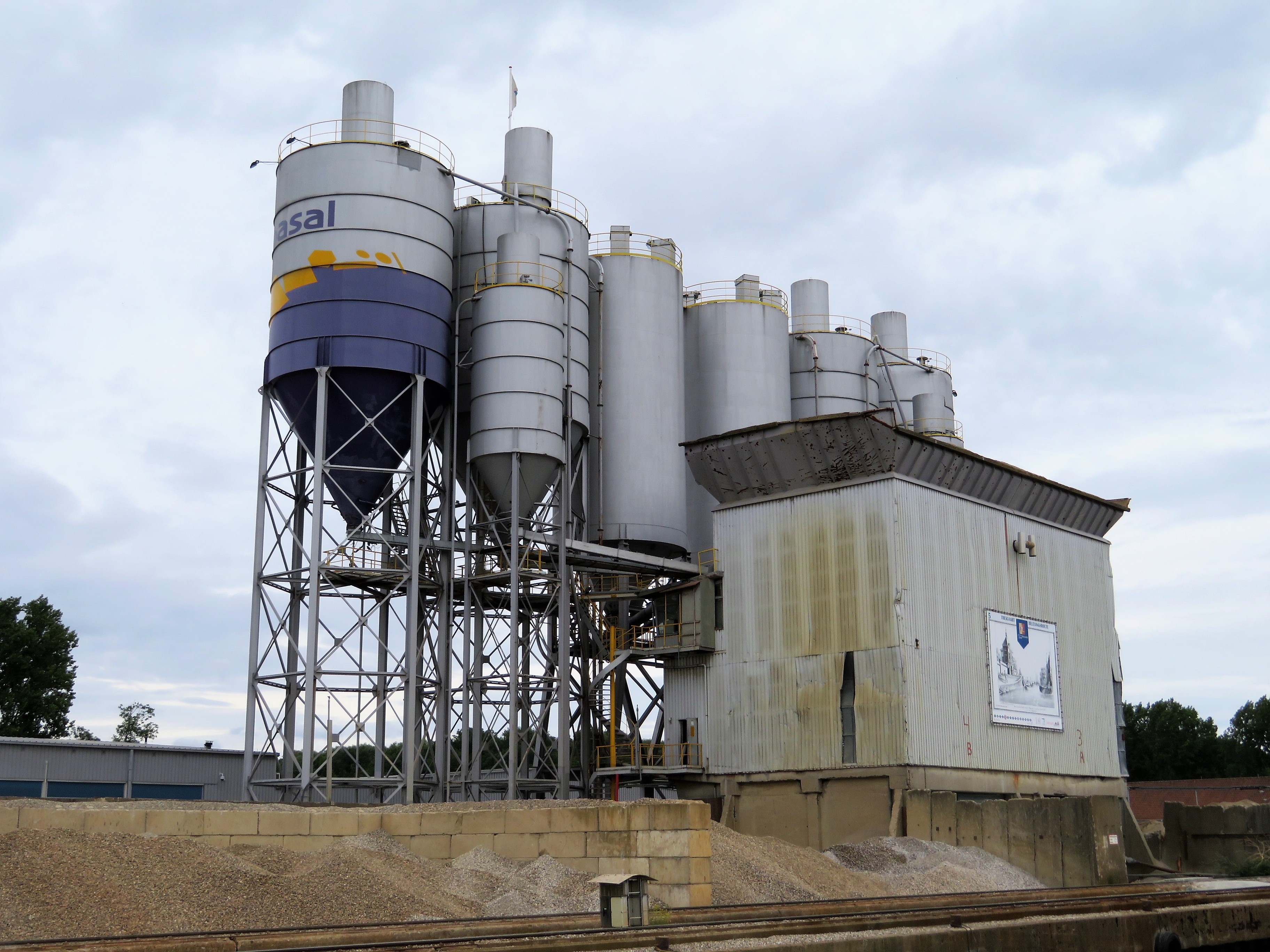 BASAL betonmortelbedrijf in Delft